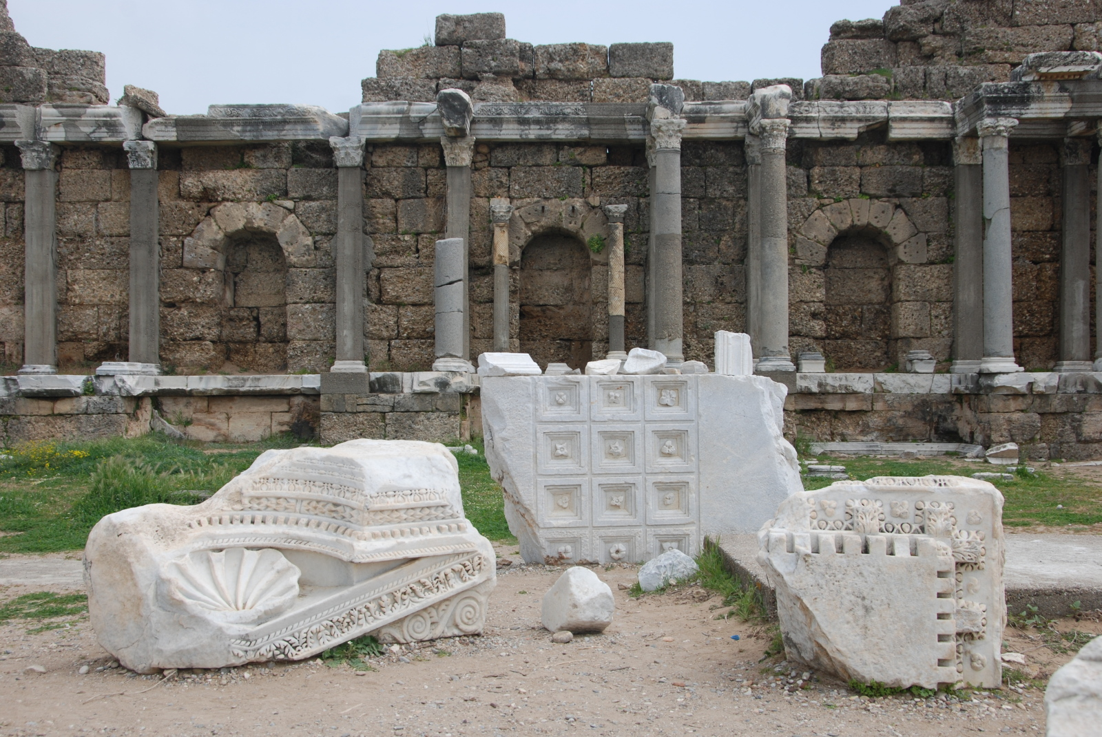 Die östliche Seite der Staatsagora, davor einige Architekturelemente aus Marmor.